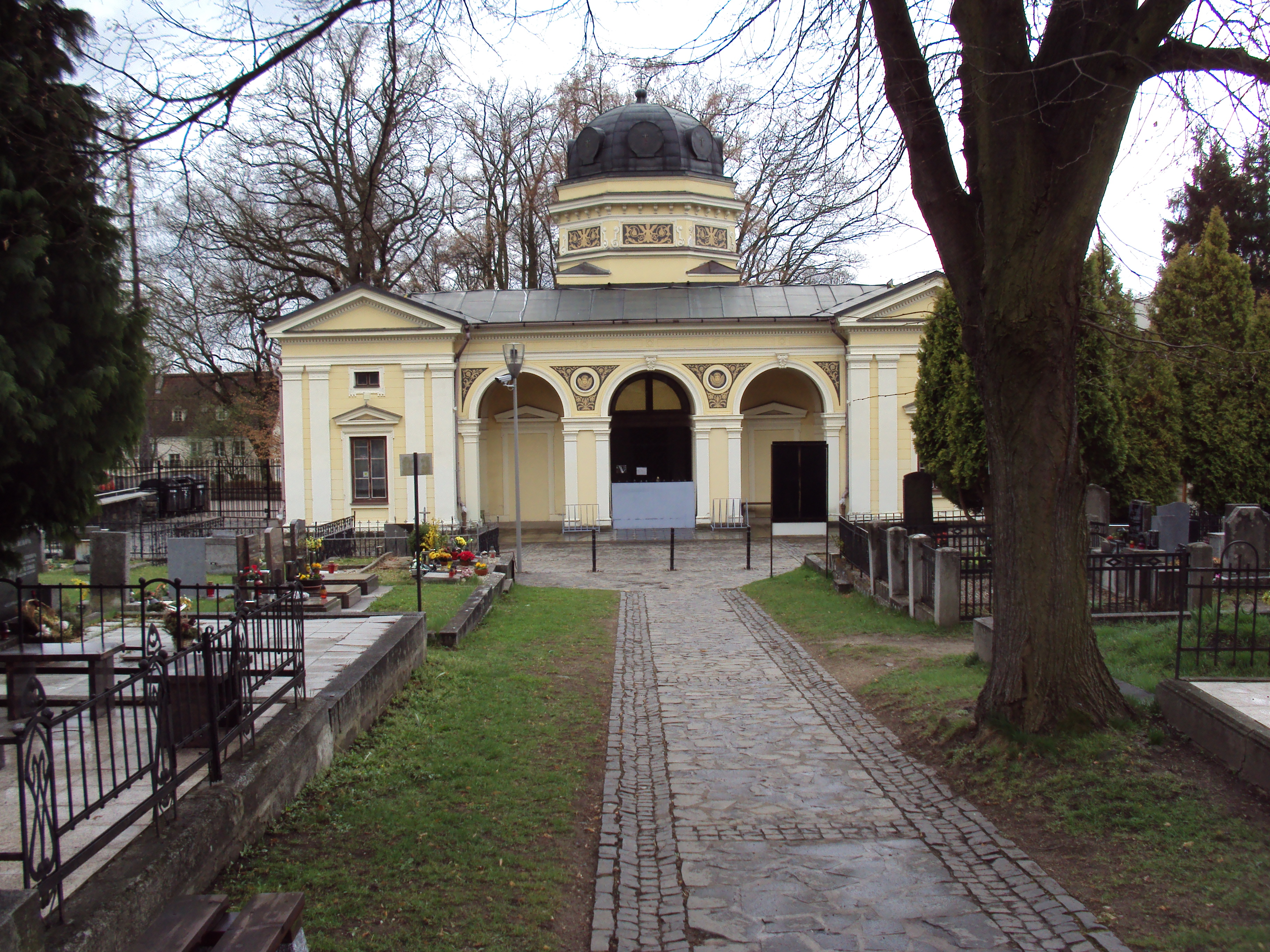 Vstupní hala hřbitova z vnitřku areálu